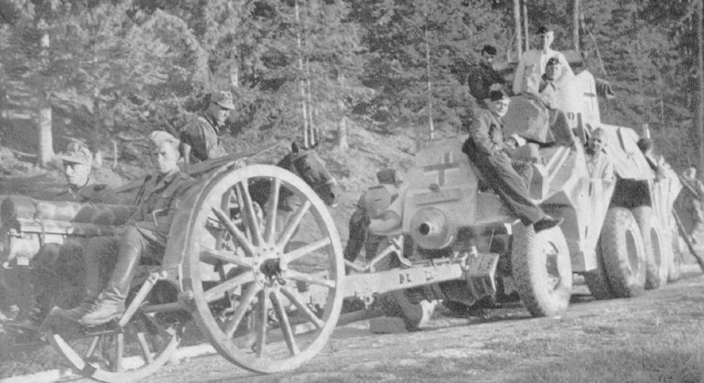 Nemški in domobranski vojaki